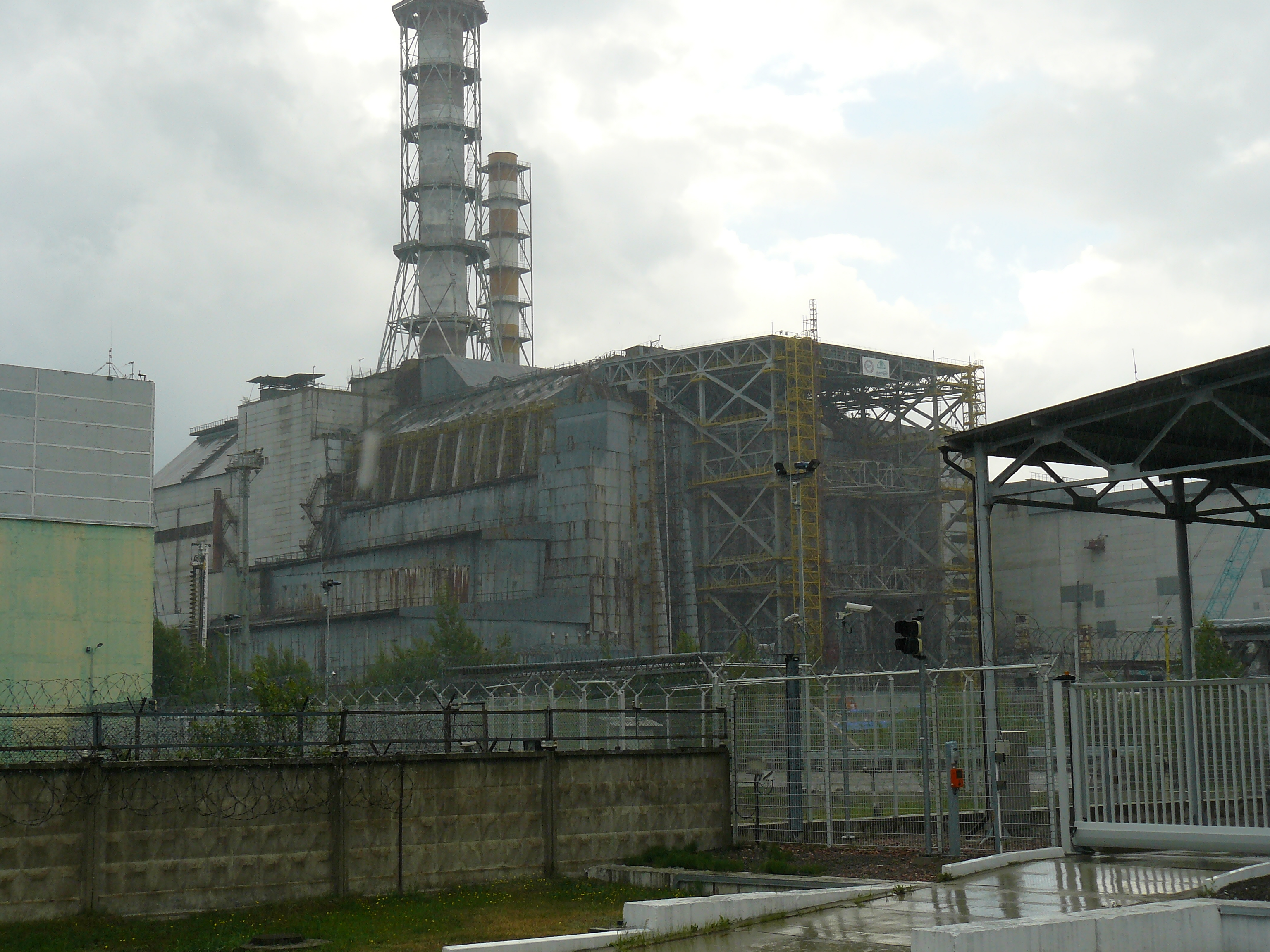 Вікіекспедиція до Чорнобильської зони